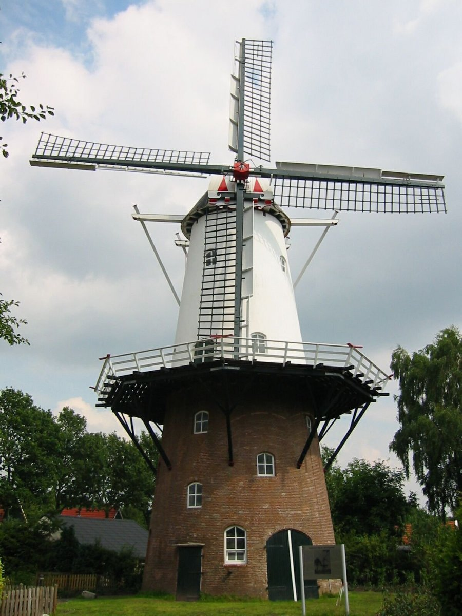 Veldkamp's Meul'n/ Ten-Bruggencatenummer: 06422: Ronde stenen stellingmolen van voren gefotografeerd (opmerking: Foto gemaakt in het kader van het project Actualisering Monumentenregister (AMR).)